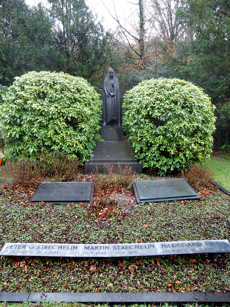 Rudolf Staechelin-Finkbeiner (1881–1946), Unternehmer, Kunstsammler, Familiengrab auf dem Friedhof Hörnli, Riehen, Basel-Stadt